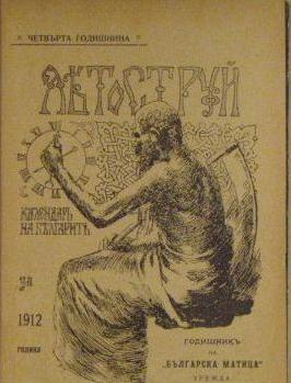 "Летоструй".